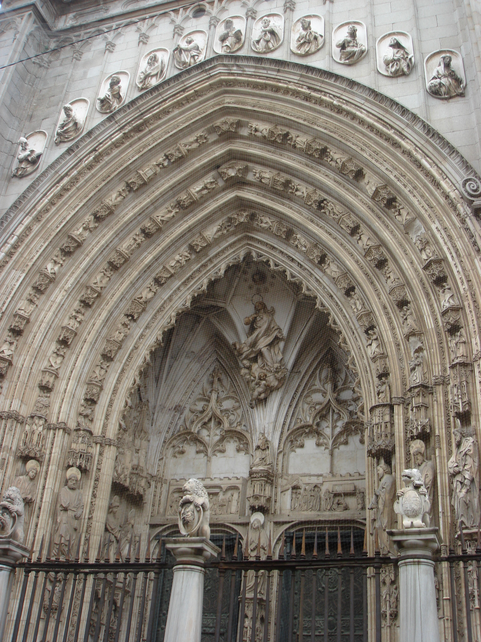 Puerta de los Leones, Catedral de Toledo, España.